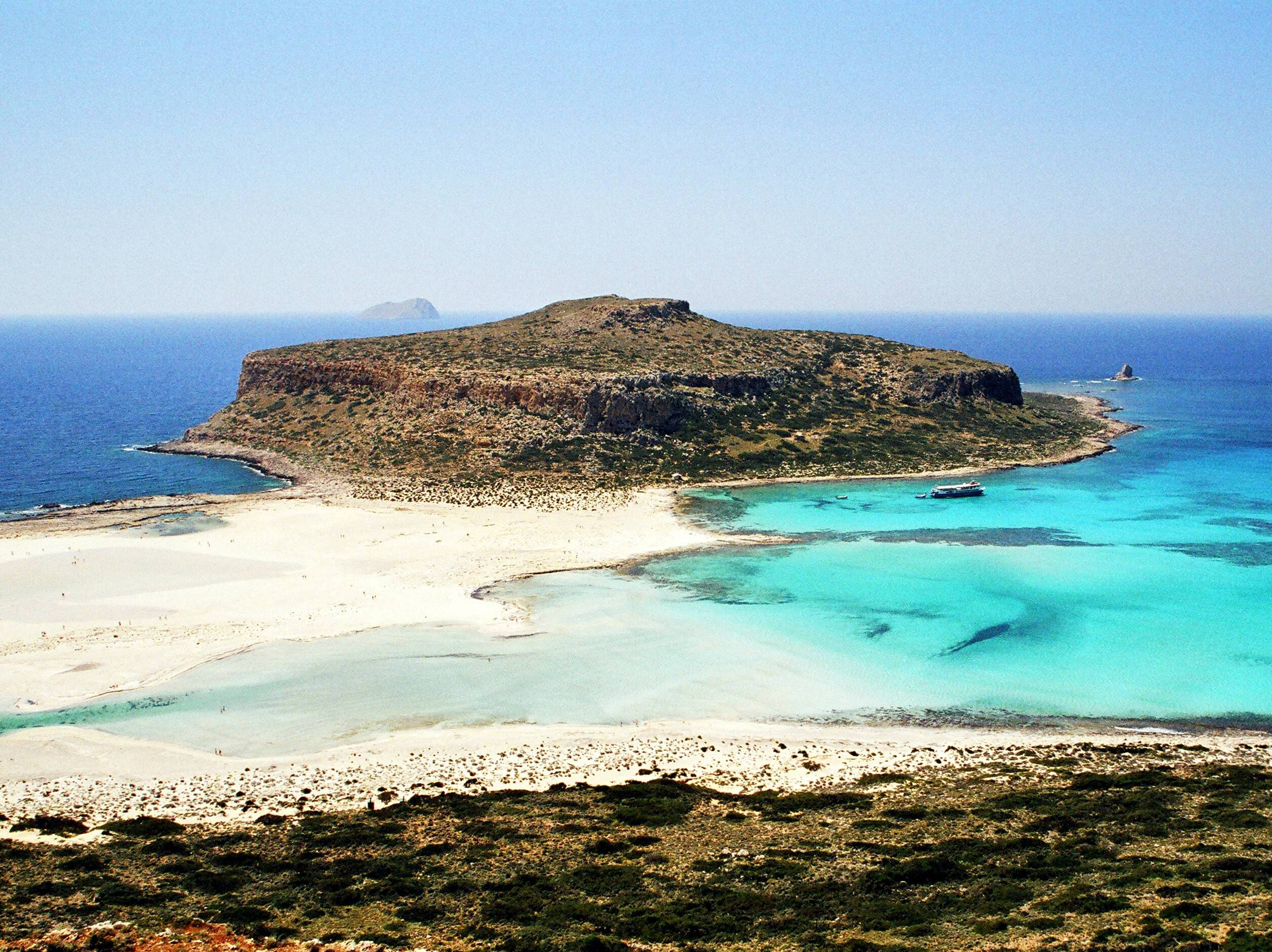 Balos, Bucht an der Nordwestseite der Halbinsel Gramvousa, Kreta (Griechenland)